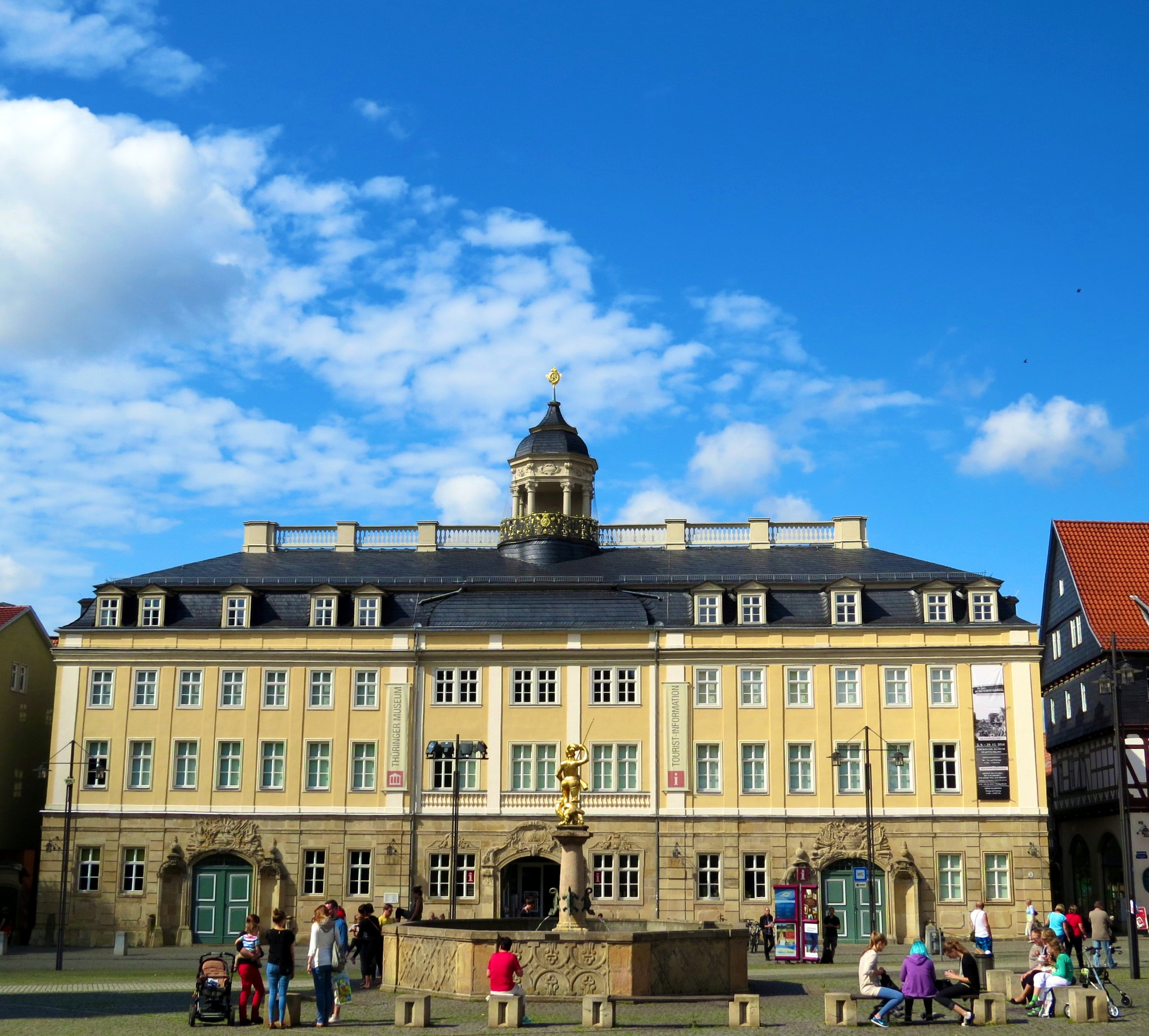 Eisenach 05-08-2014